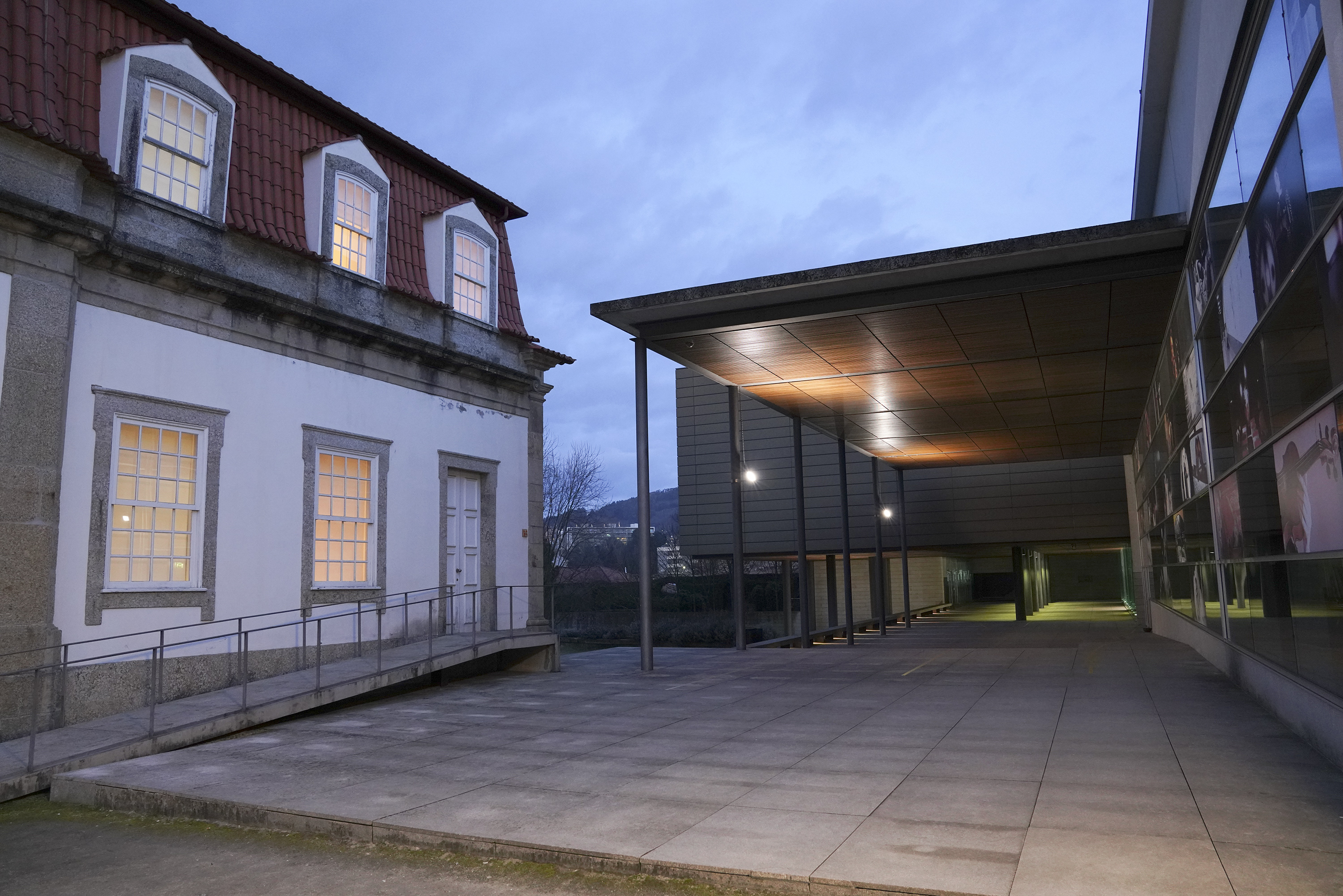 Centro Cultural Vila Flor